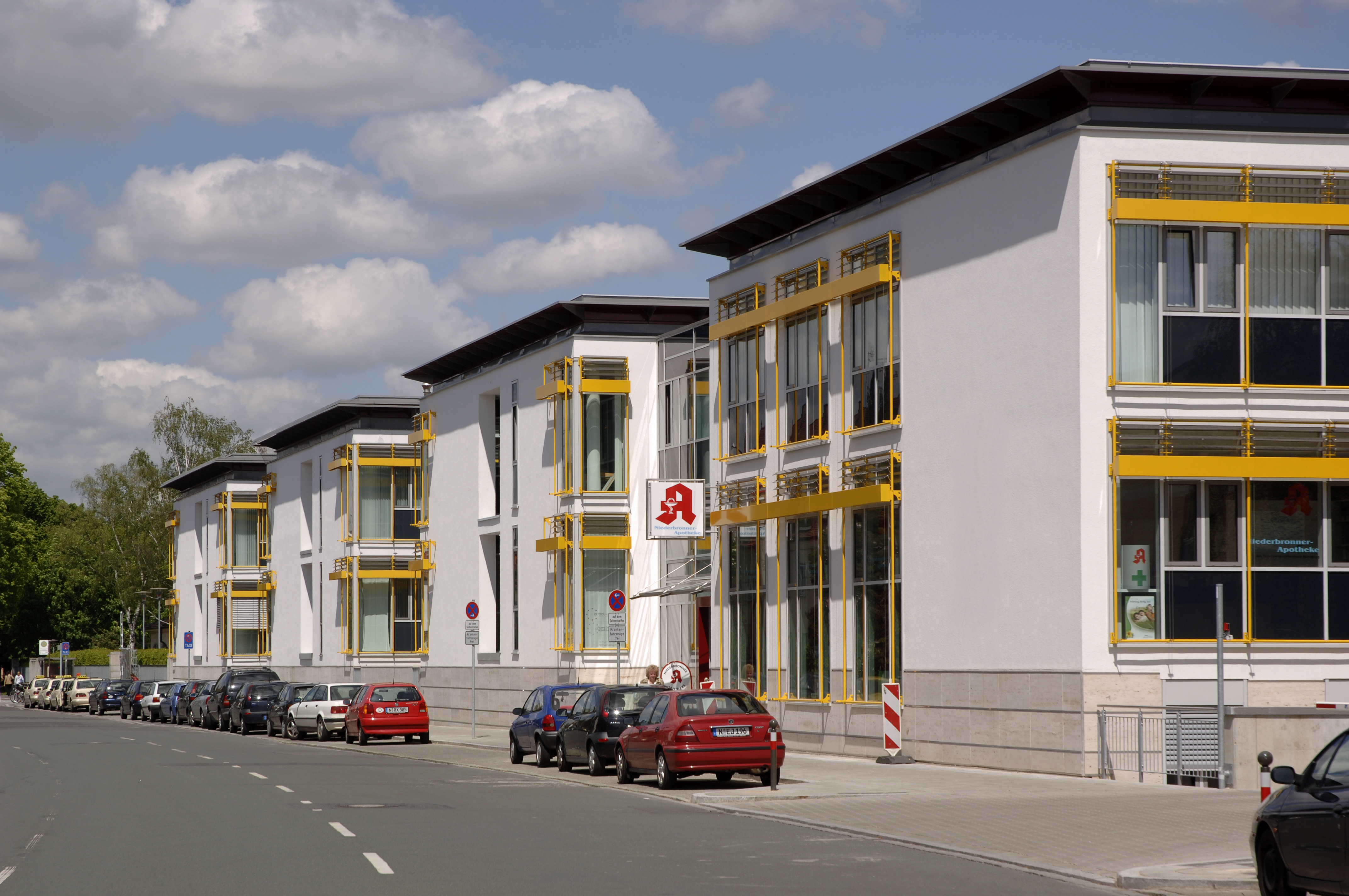 Die angegliederten Pavillions entlang der Mommsenstraße